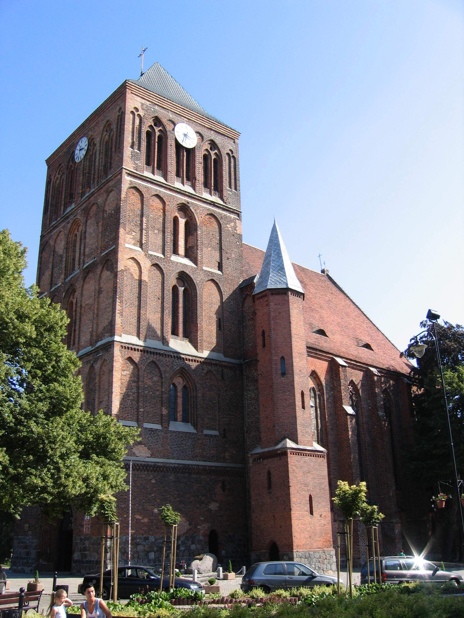 Choszczno - kościół Narodzenia NMP